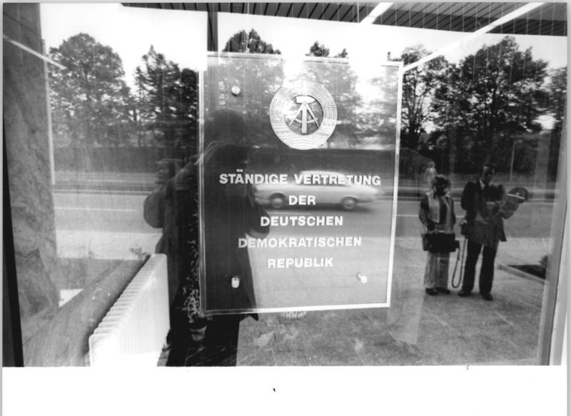 ADN-ZB 21.5.1974 BRD-Bonn Ständige Vertretung der DDR Entsprechend dem Grundlagenvertrag und dem Protokoll vom 14.3.1974 wurde die Ständige Vertretung der Deutschen Demokratischen Republik in der BRD am 2.5.1974 in Bonn eröffnet.